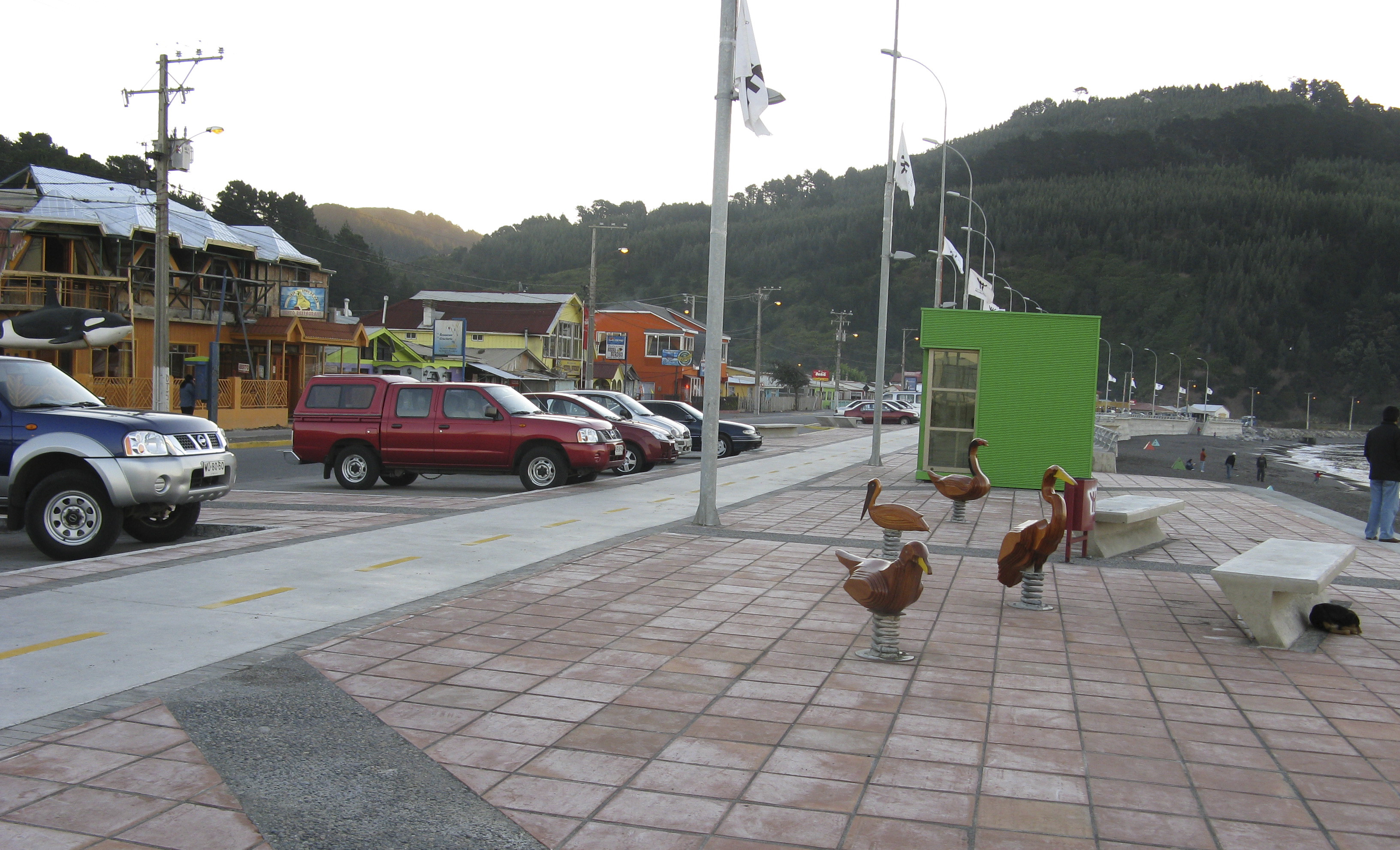 Costanera y restaurantes de Caleta Lenga, comuna de Hualpén Gran Concepción, VIII Región del Biobío, Chile Abril de 2008